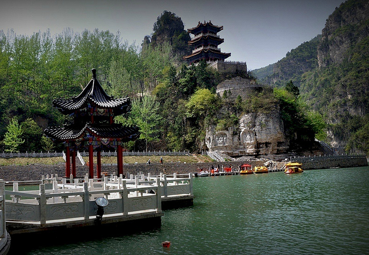 去焦作扫描